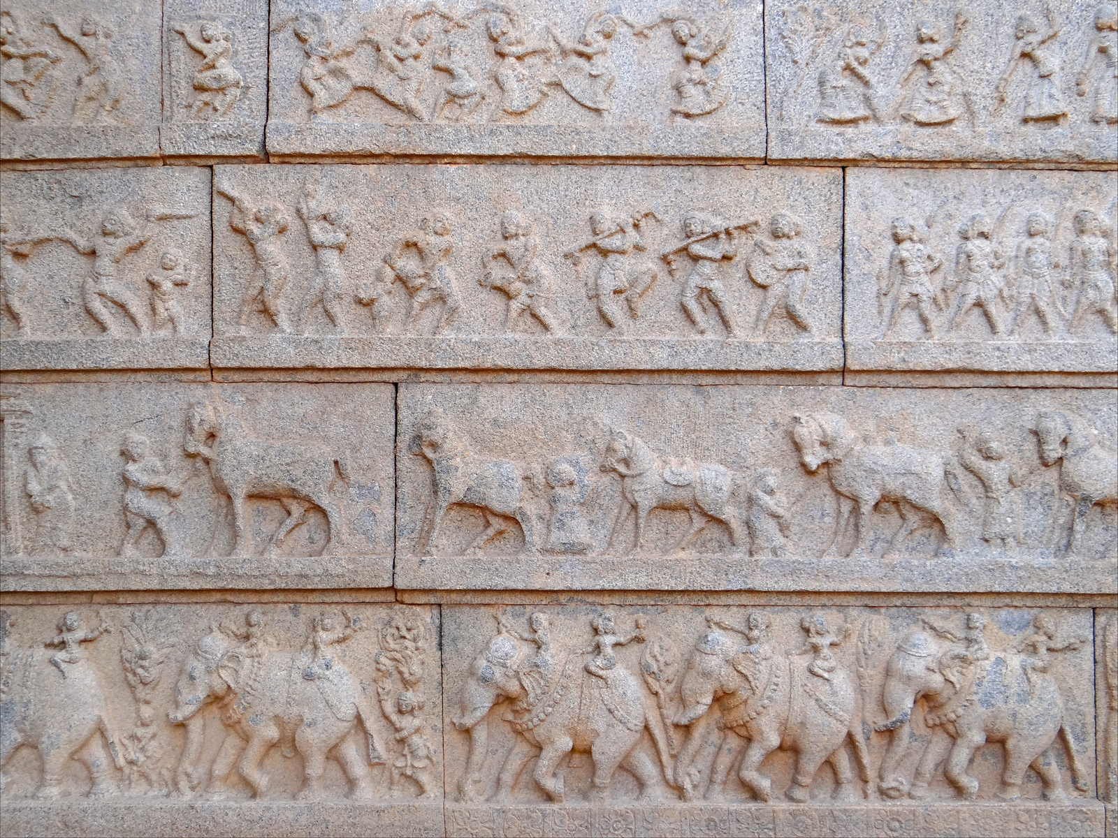 Hazare Rama, or thousand Rama (the 7th avatar of Rama), is one of many Hindu temples in Vijayanagara Karnataka. These bas reliefs, carved before the start of the Mughal Empire in South Asia, show a spectrum of musical instruments, dance mudras (pose), arts, dress and other cultural elements of Hindus in Vijayanagar Karnataka India. The panels show Ramayana, the life story of Rama and Sita. Bas-reliefs sur les murs extérieurs du temple Hazara Rama. Le temple aux 1000 Rama(s) était la chapelle privée du souverain de Vijayanagar. Il est situé au coeur du palais royal. L'enceinte extérieure est recouverte de bas-reliefs avec de nombreuses représentations de danseuses et musiciens mais également de guerriers et d'animaux mythiques. Le sanctuaire principal est dédié à Vishnou (Rama est le 7ème avatar de Vishnou). Sur les murs extérieurs du sanctuaire, une série de bas-reliefs représentent le Ramayana, (l'exil de Rama, l'enlèvement de Sita par Ravana et la guerre victorieuse de Rama aidé par l'armée des singes dirigée par Hanuman) Site officiel=